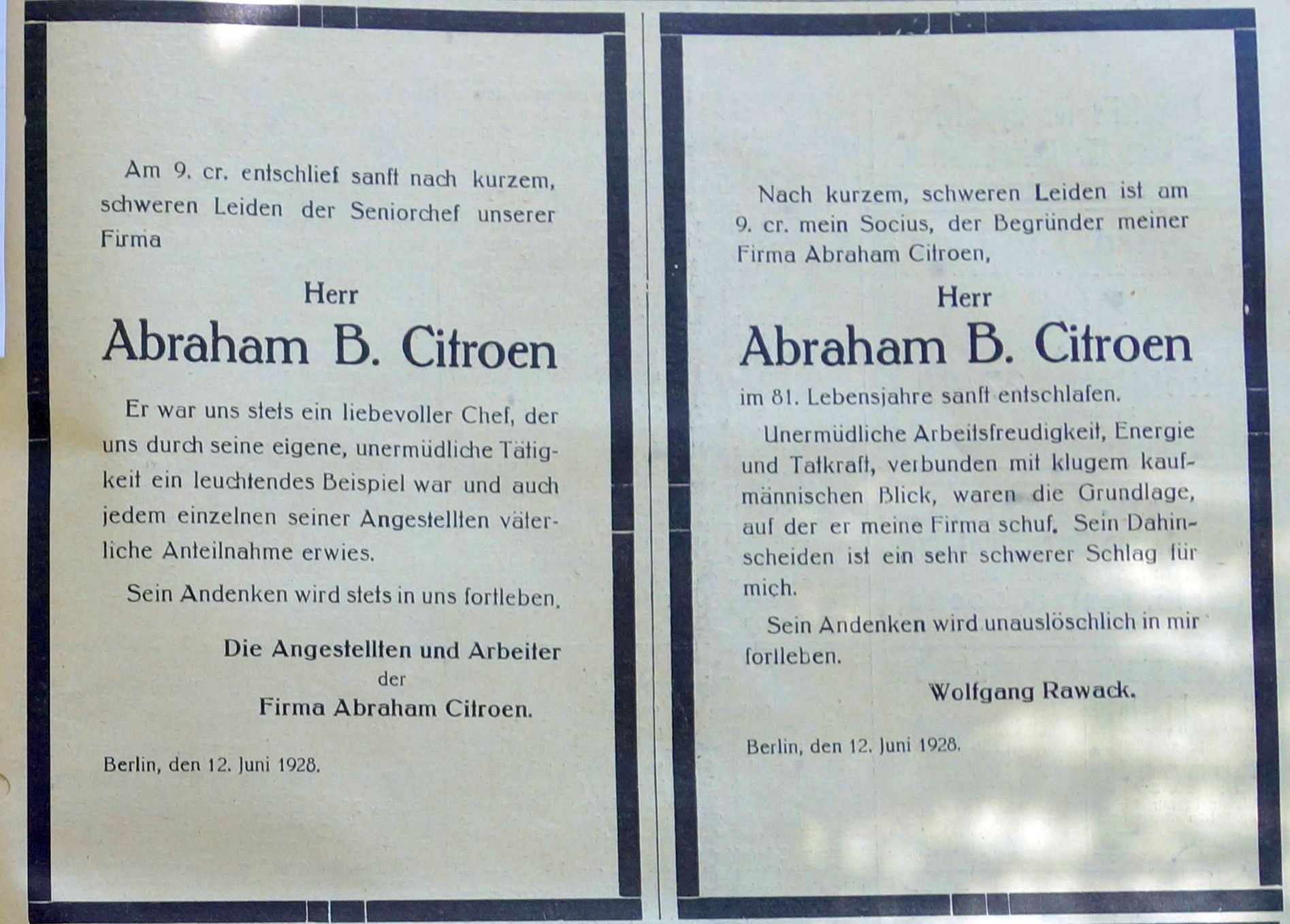 Abraham B. Citroen. Todesanzeigen. Das Unternehmen A. B. Citroen gehörte zu den Begründern der Pelz-Engros-Konfektion[1] und zu den angesehensten Pelzkonfektionsfirmen Berlins, dem ehemaligen Zentrum der deutschen Konfektions- sowie Pelzindustrie. Die Führung der Firma A. B. Citroen war allmählich auf Hendrik Citroen übergegangen und der „alte Citroen“, wir er jetzt allgemein genannt wurde, „widmete sich fast ausschließlich seiner Lieblingsbeschäftigung, der Färberei“. Weit außerhalb, am Schlesischen Tor hatte er eine Pelzveredlungsfabrik eröffnet „und schuftete dort unermüdlich wie der geringste seiner Arbeiter an den Bottichen, um den Geheimnissen der Farbe auf die Spur zu kommen“. Trotz großen Fleißes kam A. B. Citroen nicht voran, seine Versuche kosteten viel Geld und große Partien verdorbener Felle mussten ersetzt werden. Er suchte nach einer Nerzfarbe, die haltbar war und immer gleichmäßig aus dem Farbbad hervorkommen sollte. Es kam zu großen Auseinandersetzungen mit seinem Neffen, der die Verluste nicht länger tragen wollte. Da A. B. Citroen die Fabrik nicht aufgeben wollte, trennten sich die Partner und die Färberei erhielt den Namen Abraham Citroen.